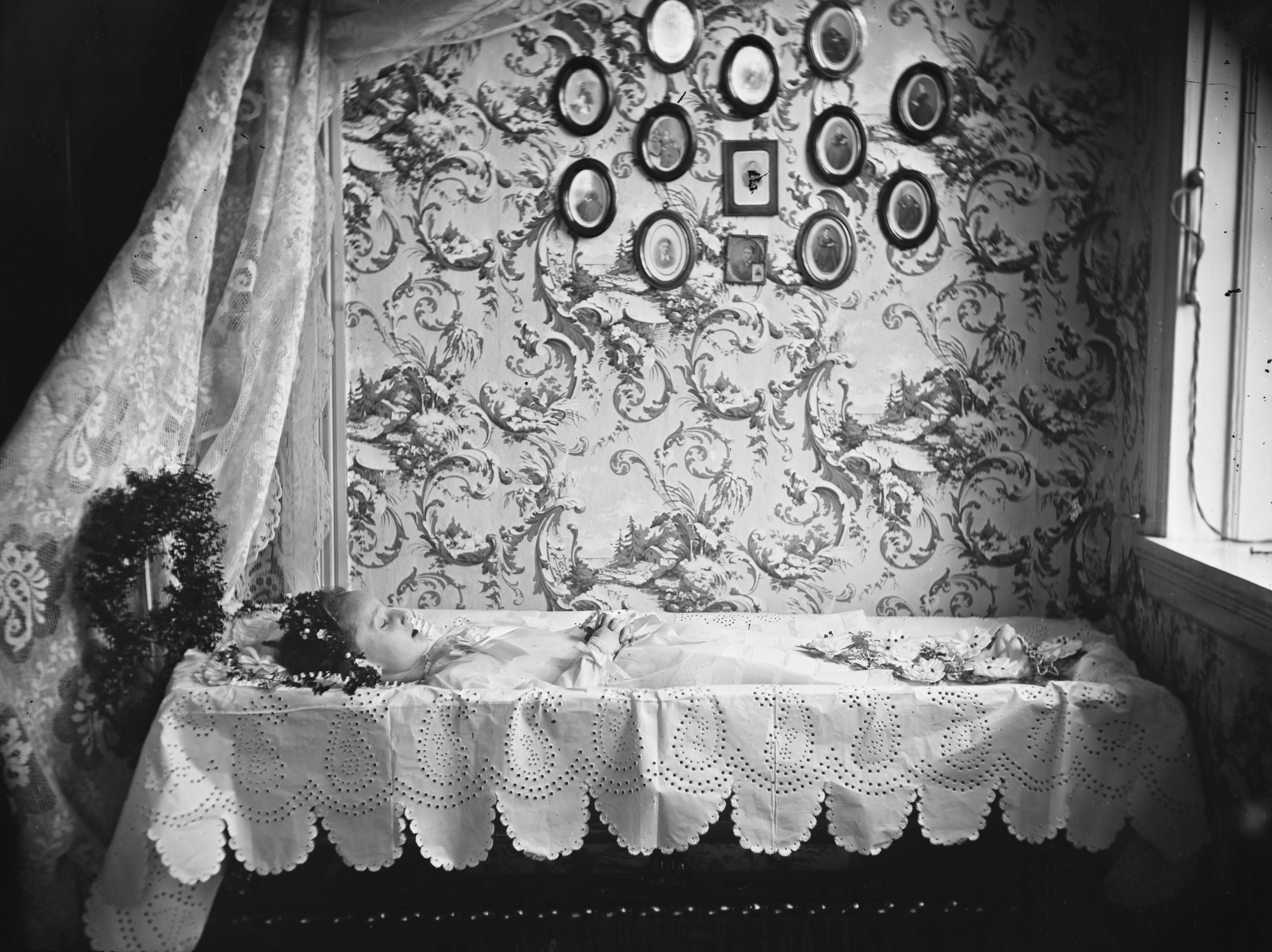 Sted: Kommune: Fylke: Tagger